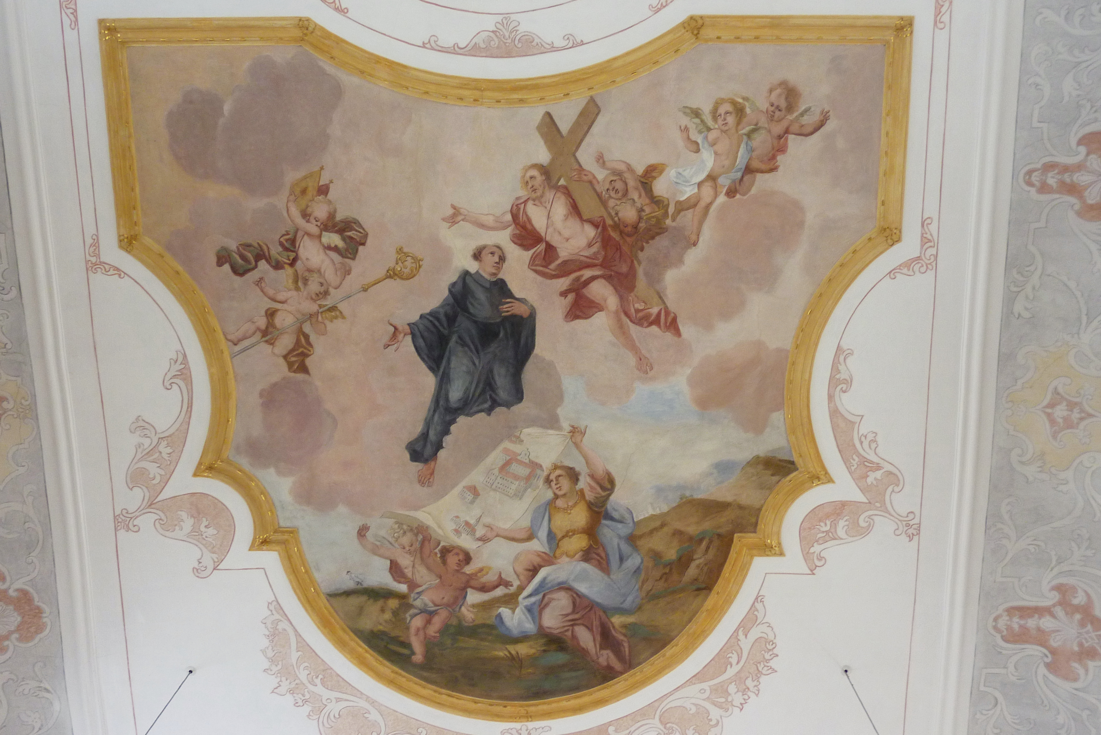 Katholische Pfarrkirche St. Leonhard in Baiershofen, einem Ortsteil der Gemeinde Altenmünster im Landkreis Augsburg (Bayern), Fresko mit Darstellung des hl. Leonhard